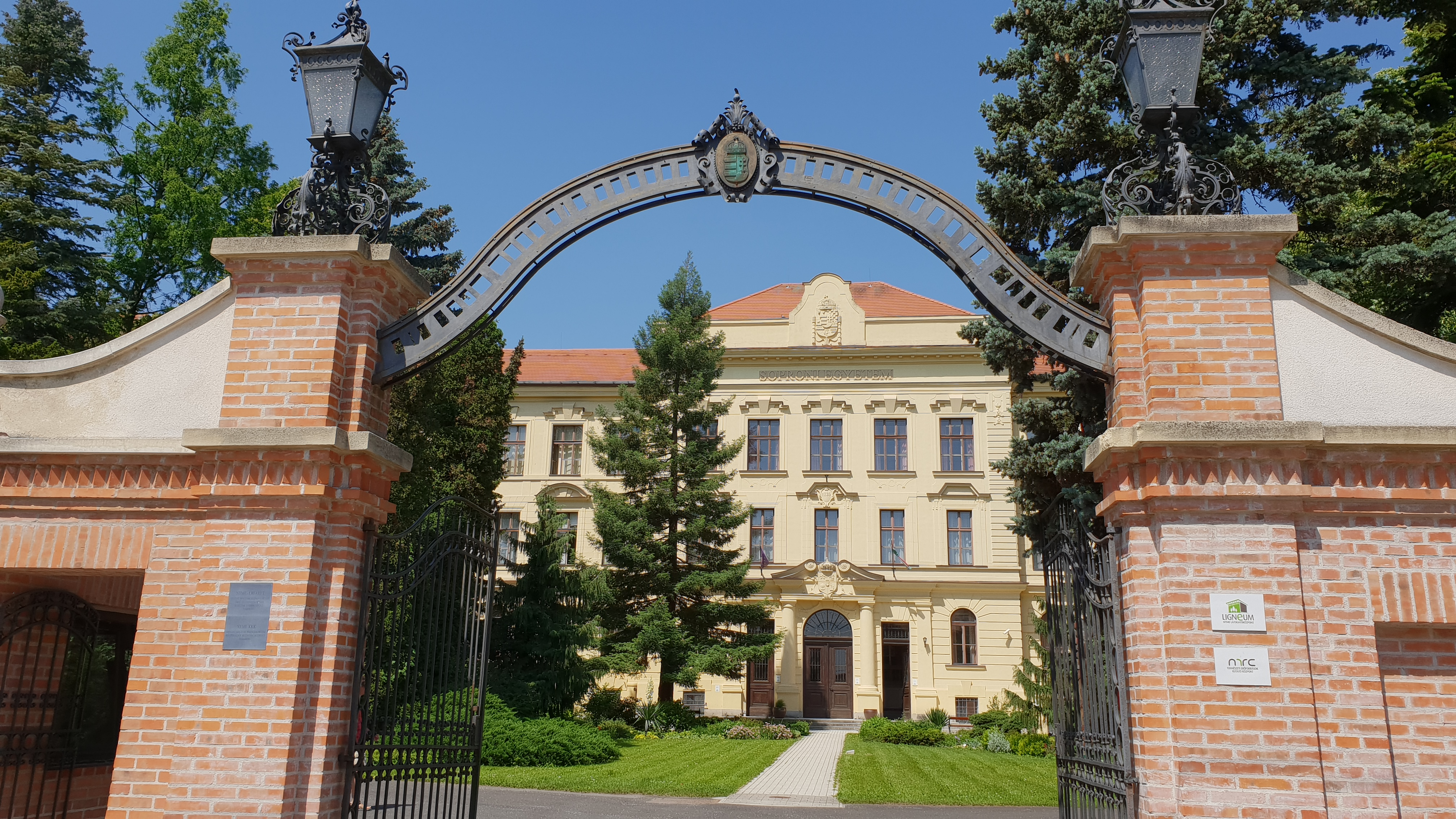 Frontkapu